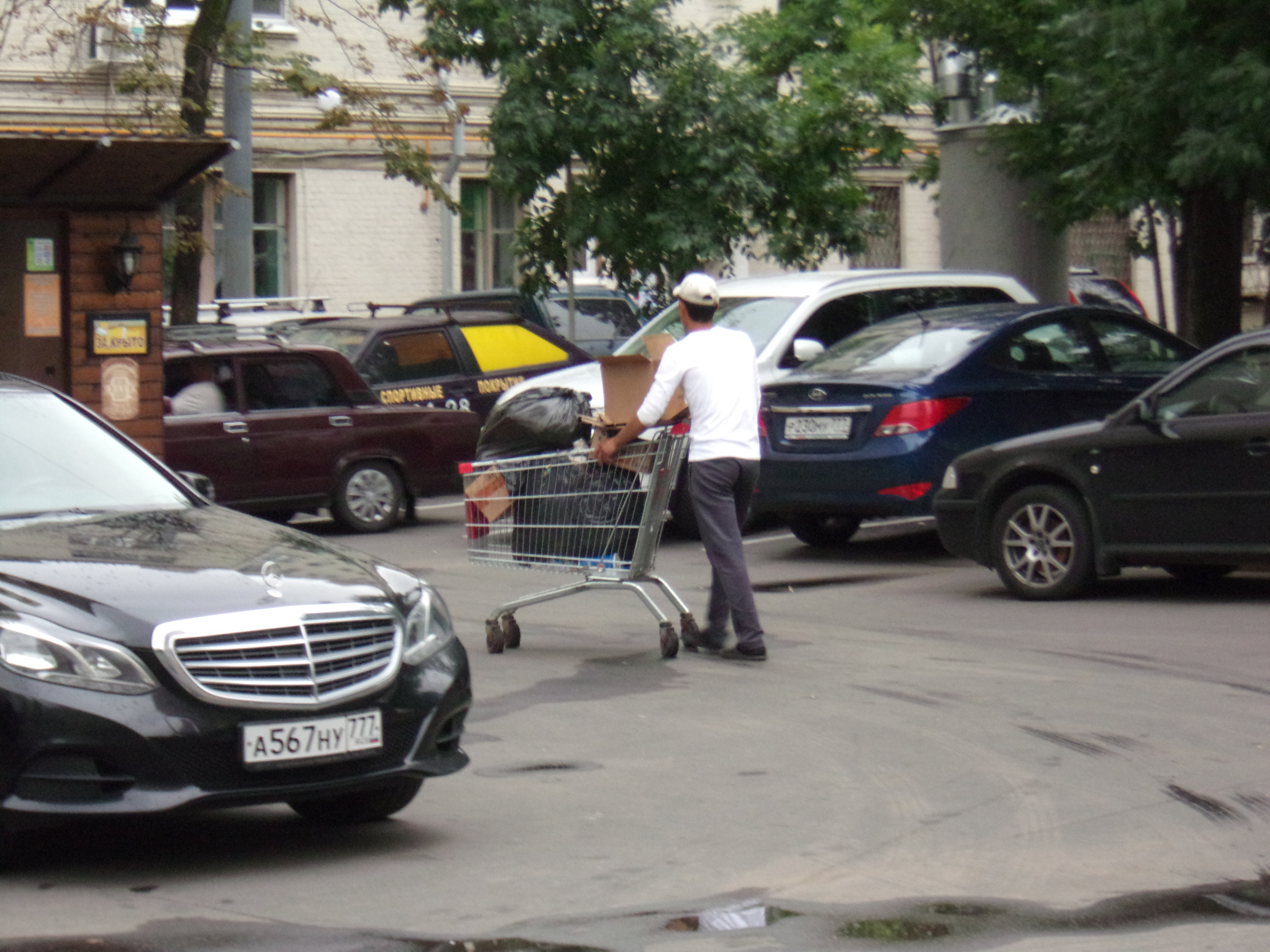 Для перевозки мусора рабочие-мигранты часто используют тележки продовольственных супермаркетов